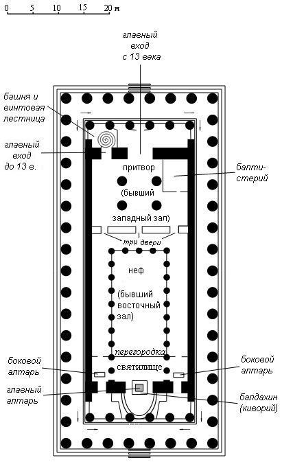 Христианский Парфенон